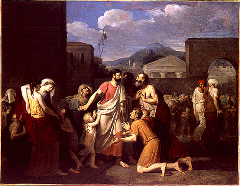 Louis Lafitte, Régulus retourne à Carthage, 1791, Paris, Ecole Nationale Supérieure des Beaux-Arts